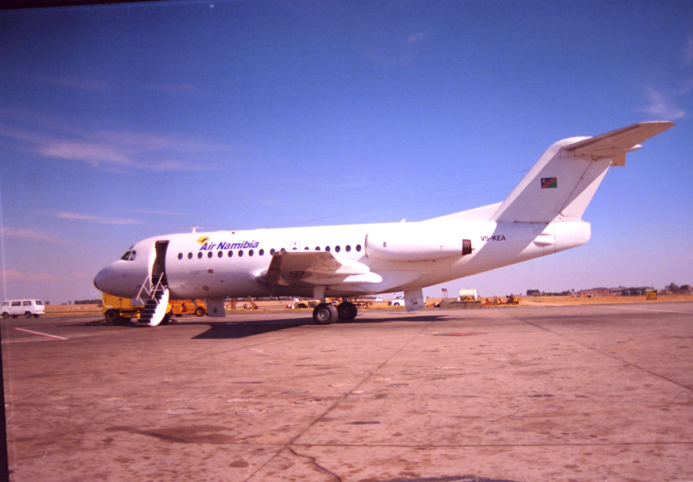 Air Namibia F-28 3000 V5-KEA